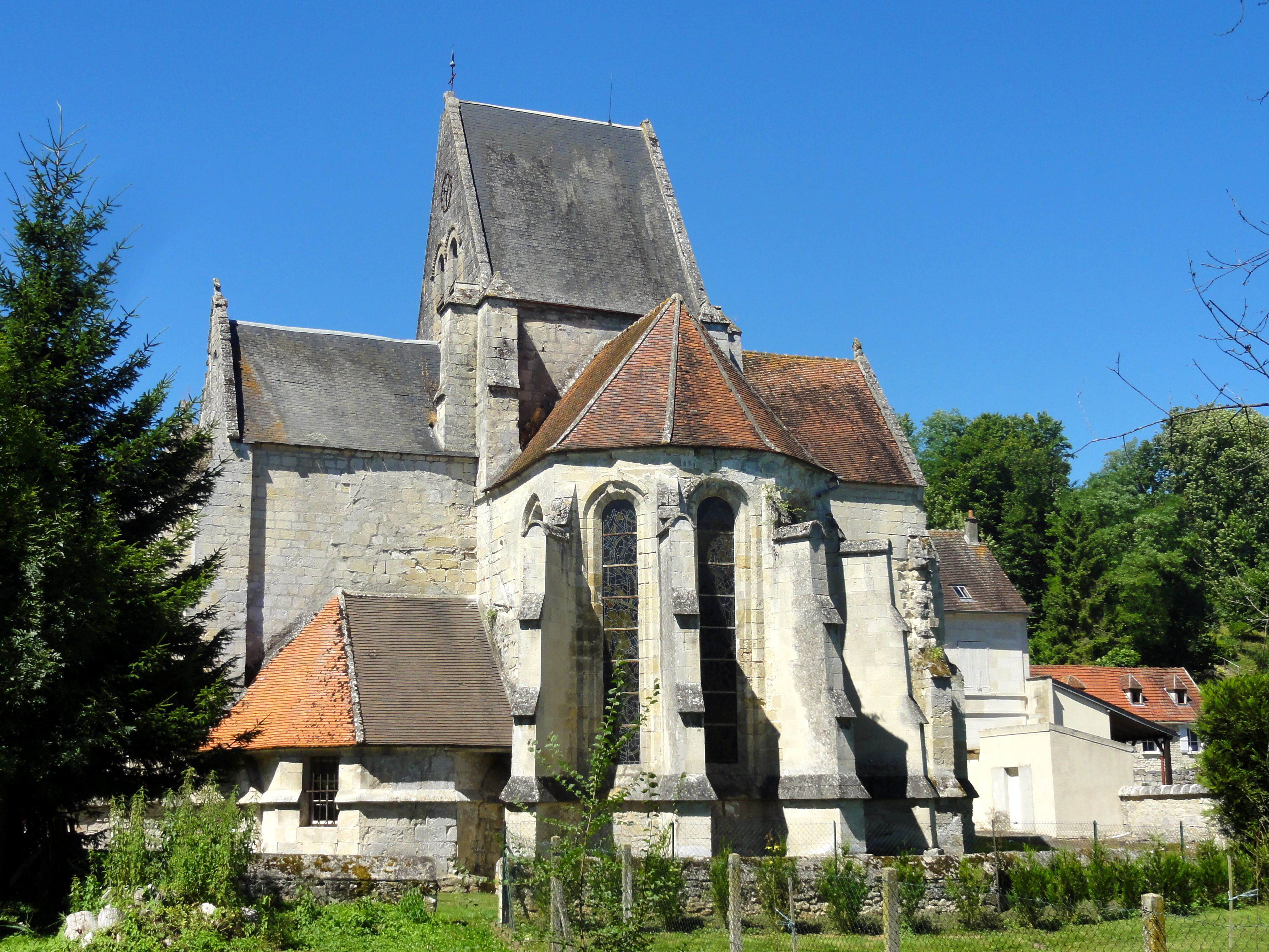 Chevet.